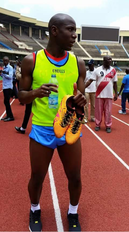 Benik Afobe avec les léopards de la RDC en 2016